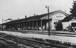 Stazione ferroviaria di Sant’Antonio Mantovano, la prima stazione costruita nel territorio mantovano (1851).